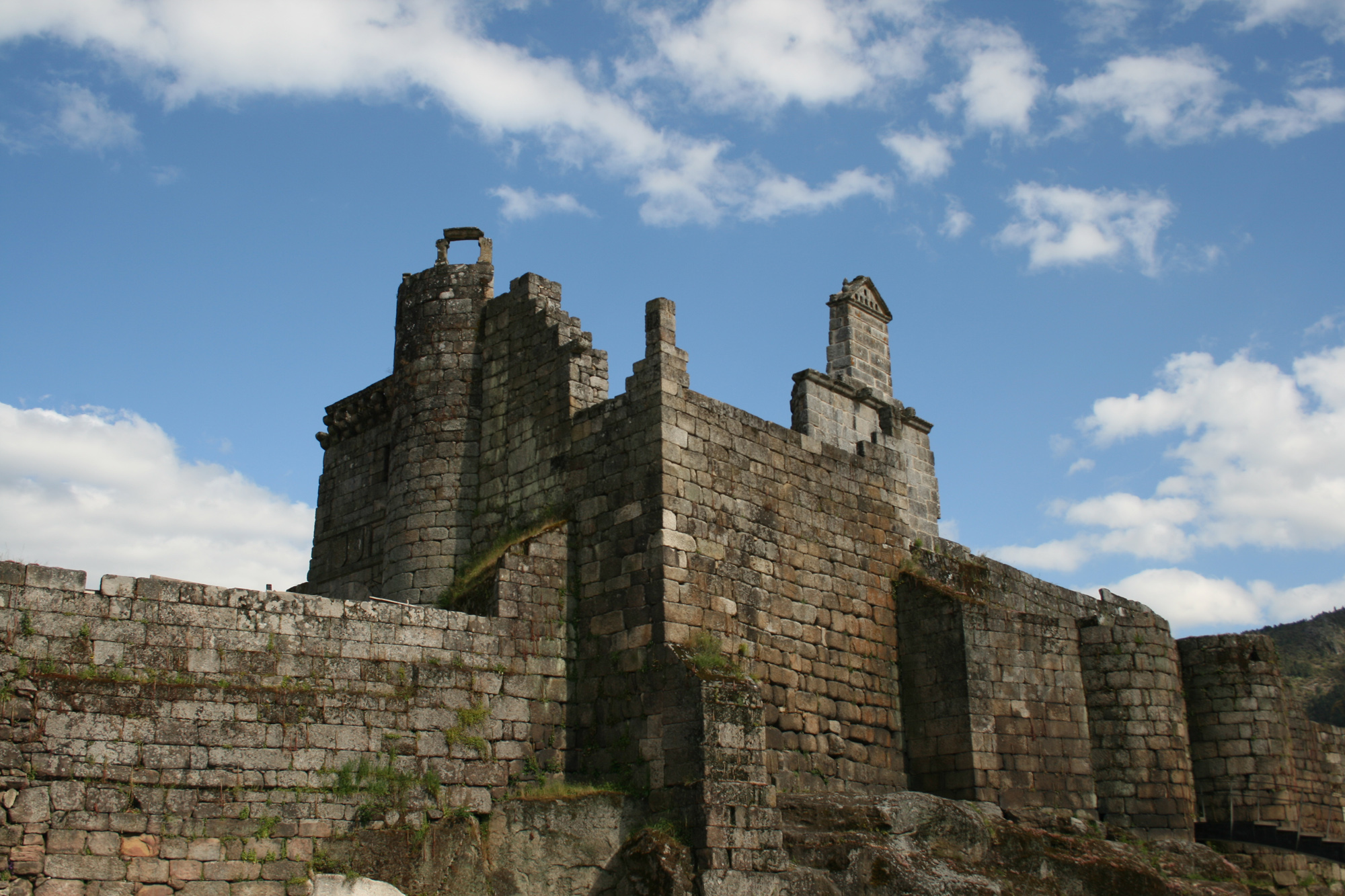 Ruinas del Castillo de los Sarmiento, en Ribadavia (Galicia, España). Castle of Sarmiento, in Ribadavia. Ruins of the Castle of Sarmiento, in Ribadavia (Galicia, Spain).